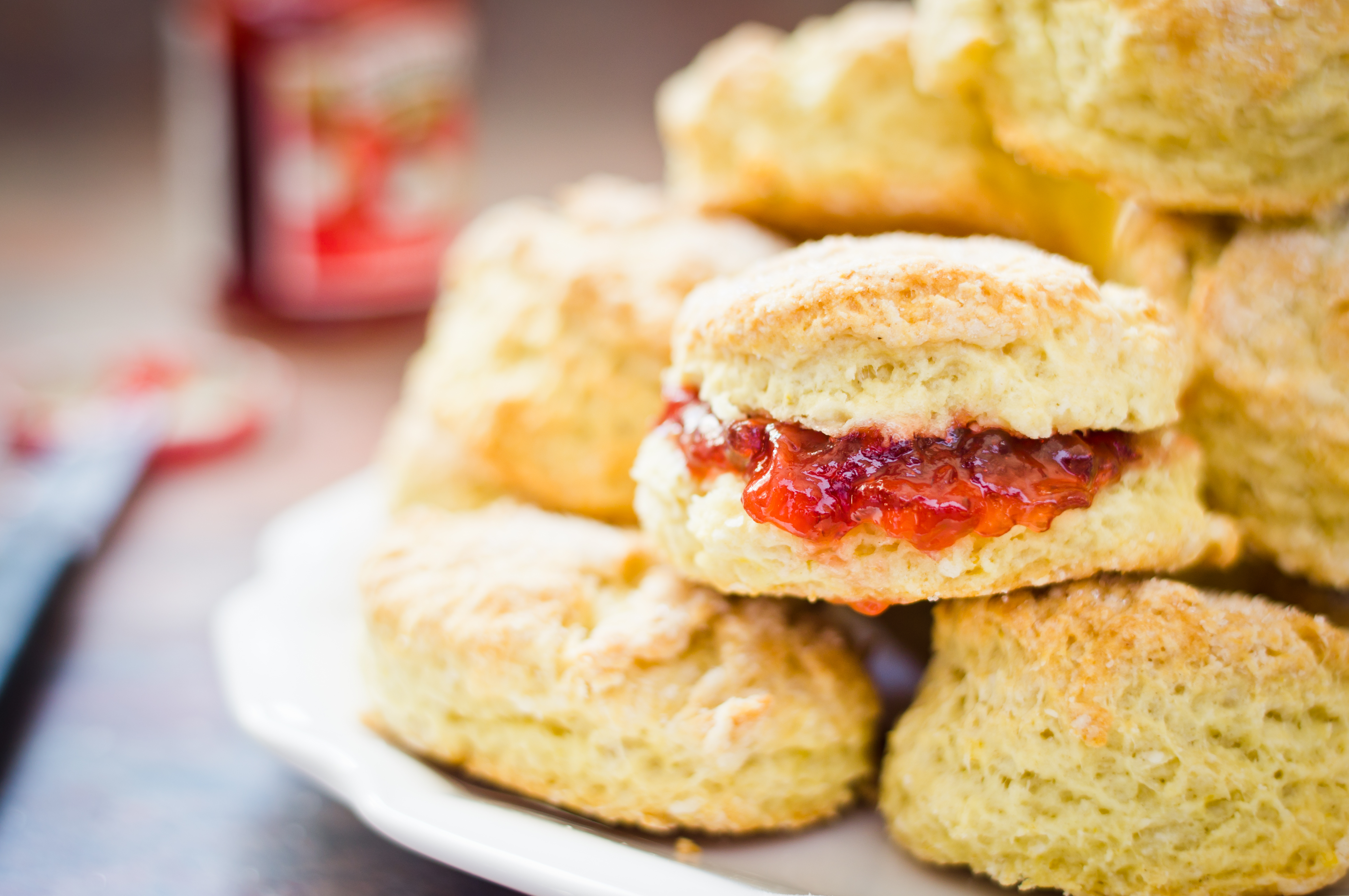 Lemon Scones